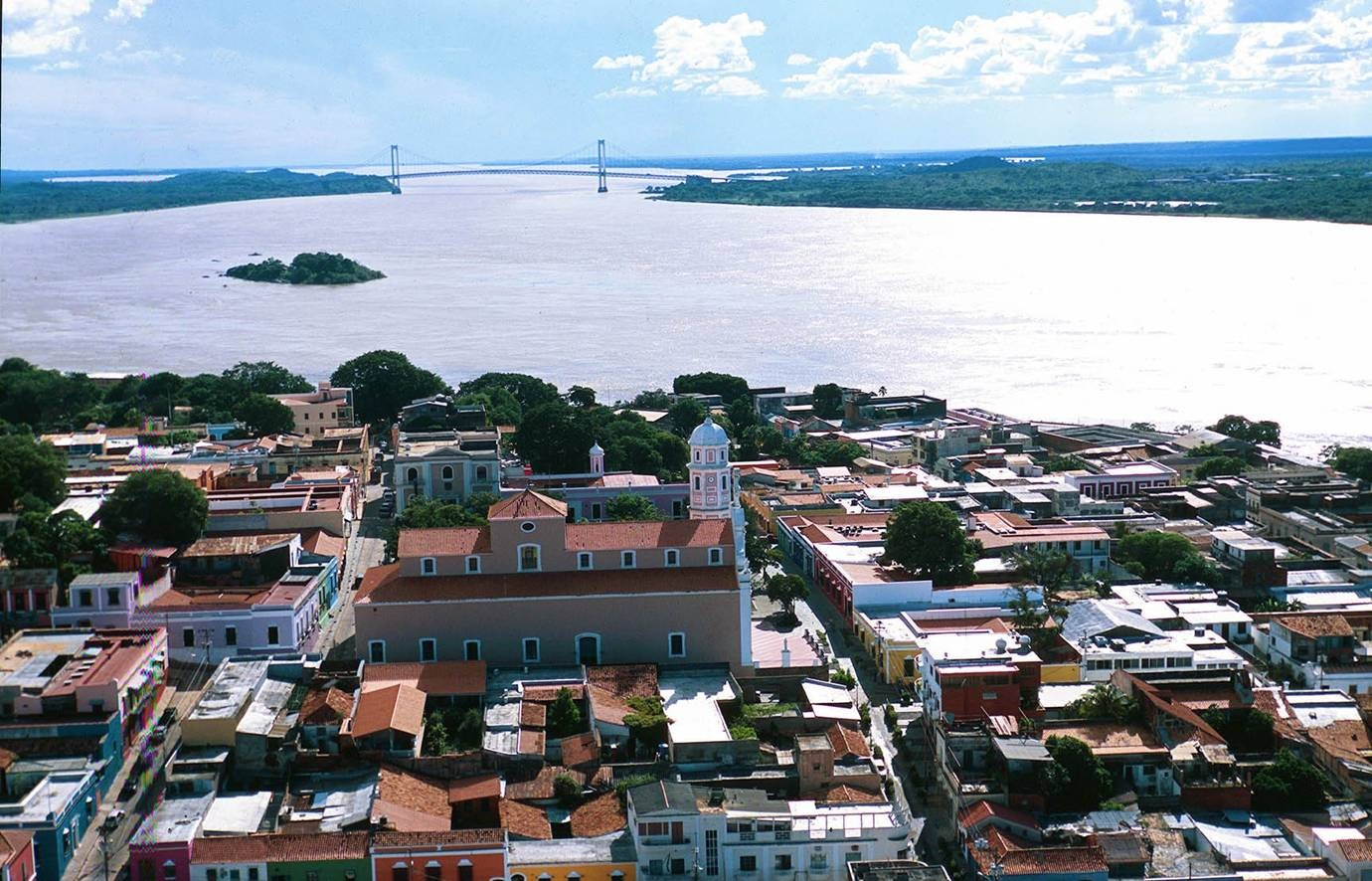 Vista del casco histórico de Ciudad Bolívar junto con el Puente de Angostura sobre el río Orinoco.